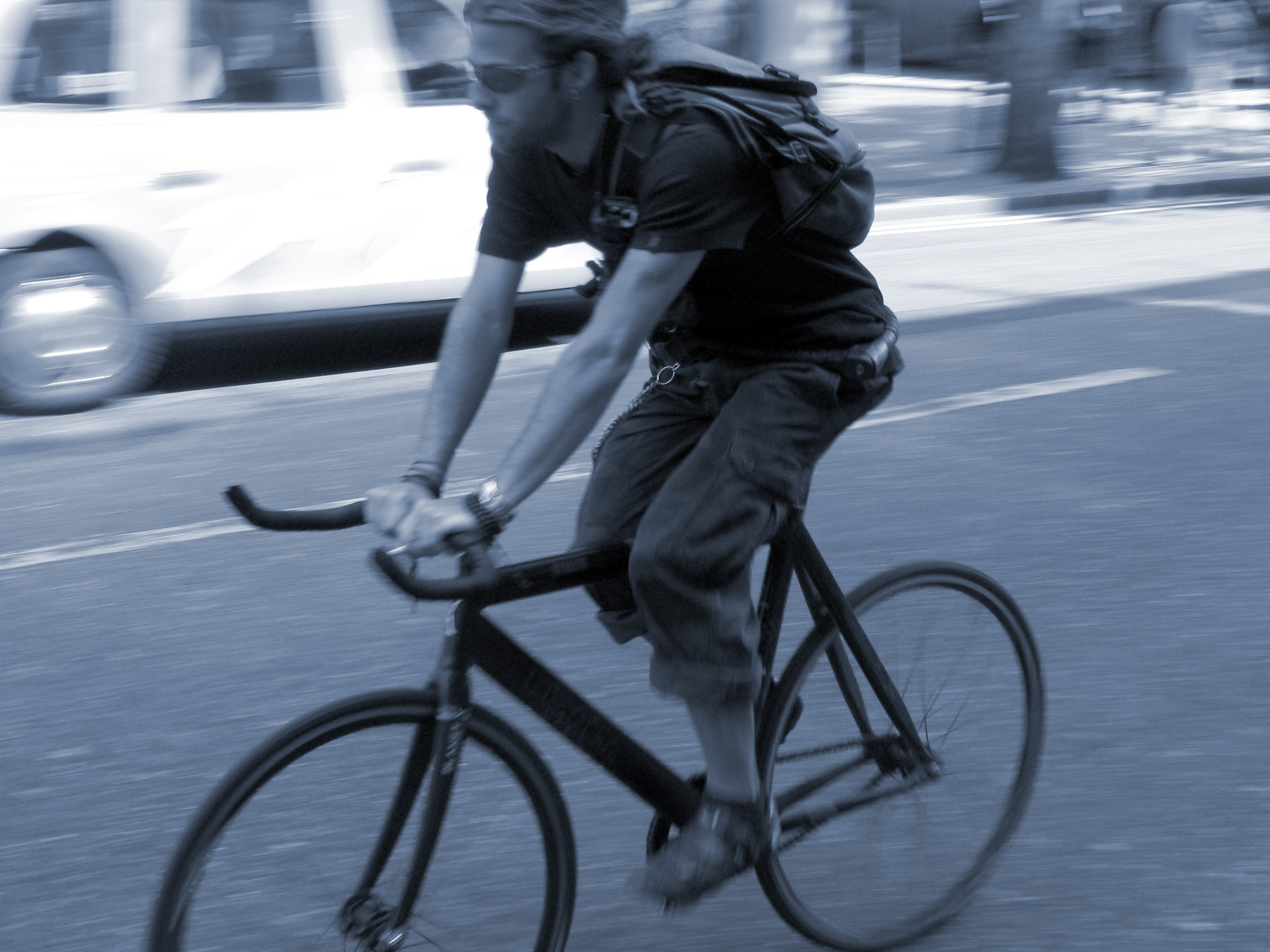 London cycle courier